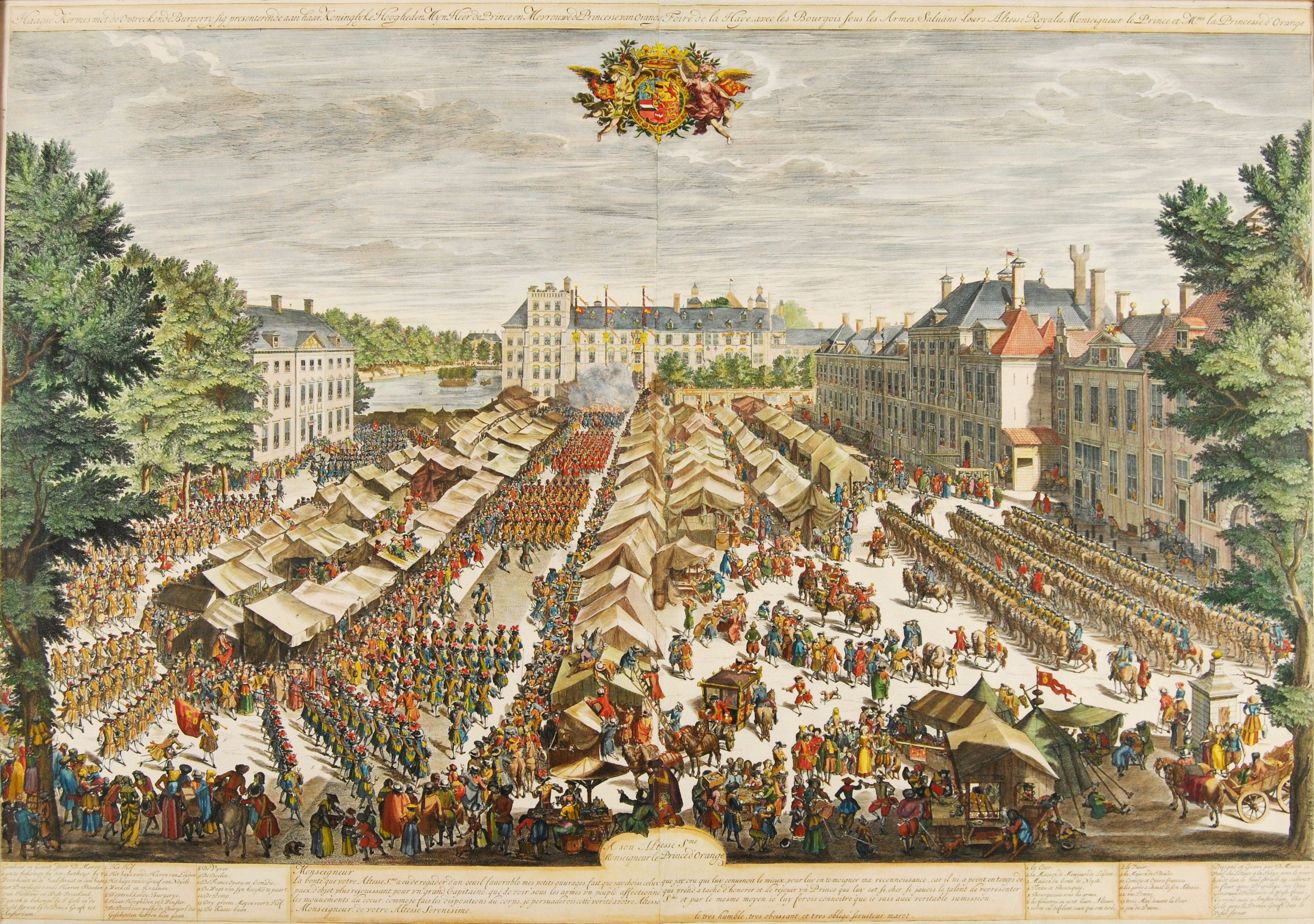 HAAGSE KERMIS MET DE OPTRECKENDE SCHUTTERIJ Ets met gravure vervaardigd in 1686 door Daniël Marot. Het Buitenhof met op de achtergrond het Stadhouderlijk Kwartier naast de Hofvijver. Links het Noyelleshuis (tegenwoordig ‘Vijverhof’). Het plein staat vol met kraampjes waartussen zich talrijke bezoekers bewegen. Rechts op de voorgrond heerst grote activiteit bij een aantal kramen, waar onder andere wafels worden gebakken. De kermis was uitgegroeid tot één groot centrum van vertier, met optredens van koorddansers, acrobaten en gedresseerde dieren, die niet alleen de belangstelling van het volk trokken, maar ook aanzienlijke Hagenaars niet koud lieten. Hier zien we het moment waarop een defilé plaats vindt van de schutterij van de stad. De schutters komen van links op en marcheren tussen de kermiskraampjes door naar het Stadhouderlijk Kwartier, om daar de wapens te presenteren. Vanuit het venster slaan de prins en zijn gevolg het defilé gade. Rechts staat de cavalerie van prins Willem III opgesteld, vlakbij de waterpomp.